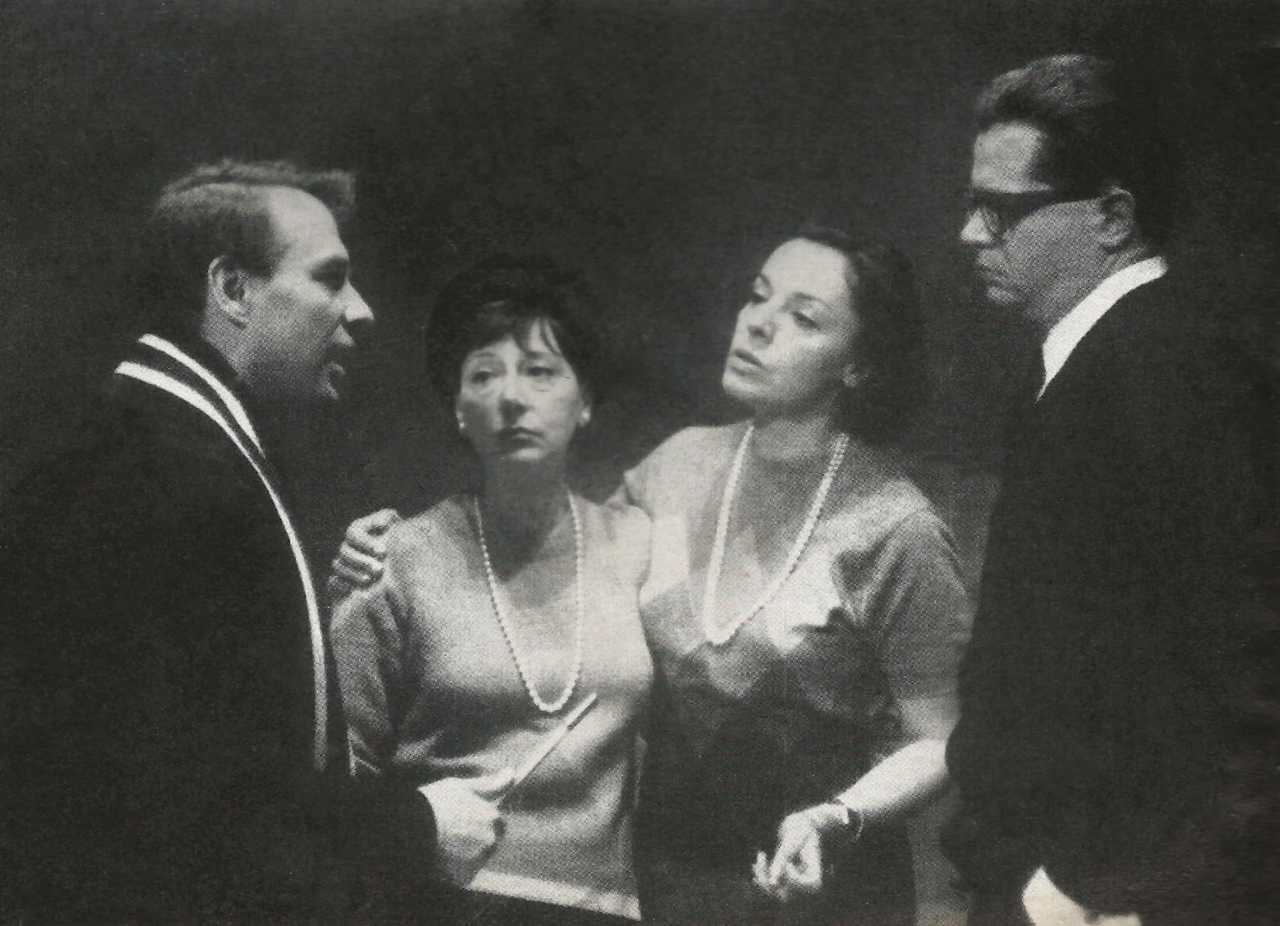 Maria Stuarda di Schiller